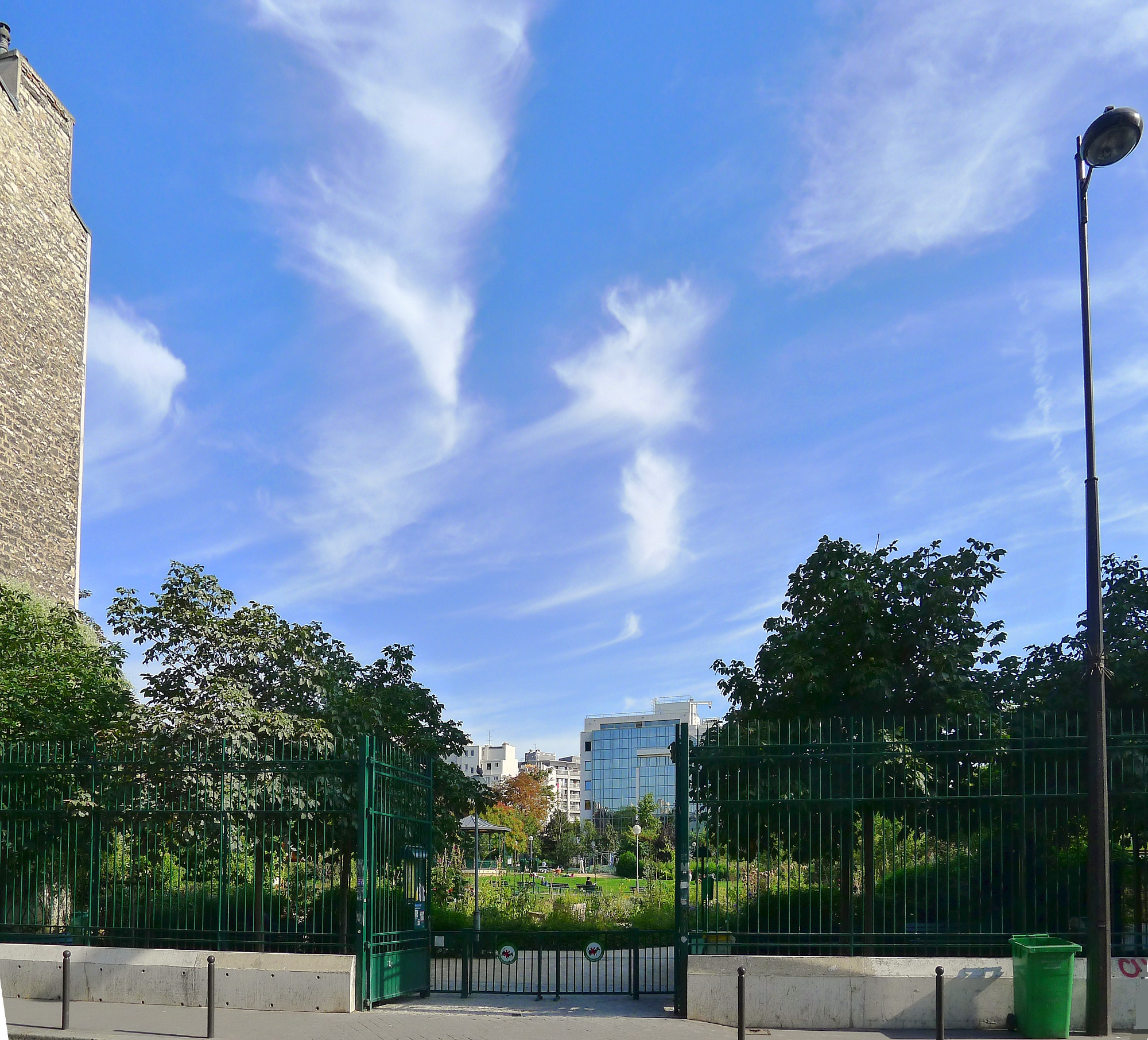 Rue des Récollets (jardin Villemin) - Paris X